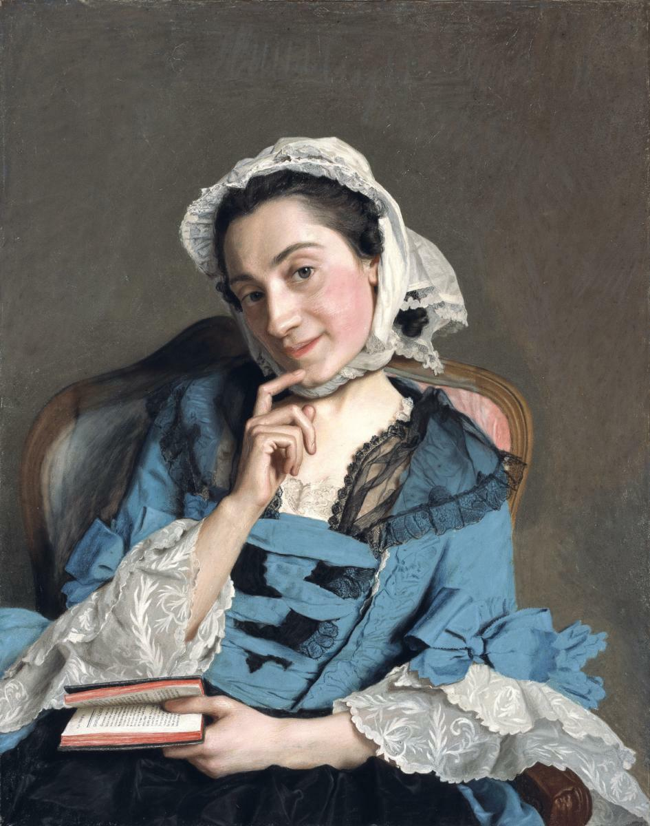 Portrait de Madame Denis-Joseph La Live d'Epinay, née Louise-Florence Pétronille Tardieu d'Esclavelles, dite Madame d'Epinay